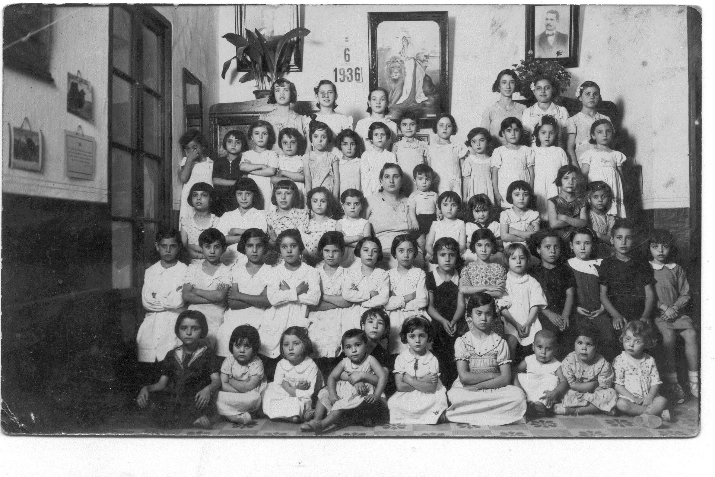 Alumnas de la escuela de José Sánchez Rosa en Sevilla, en Junio de 1936.